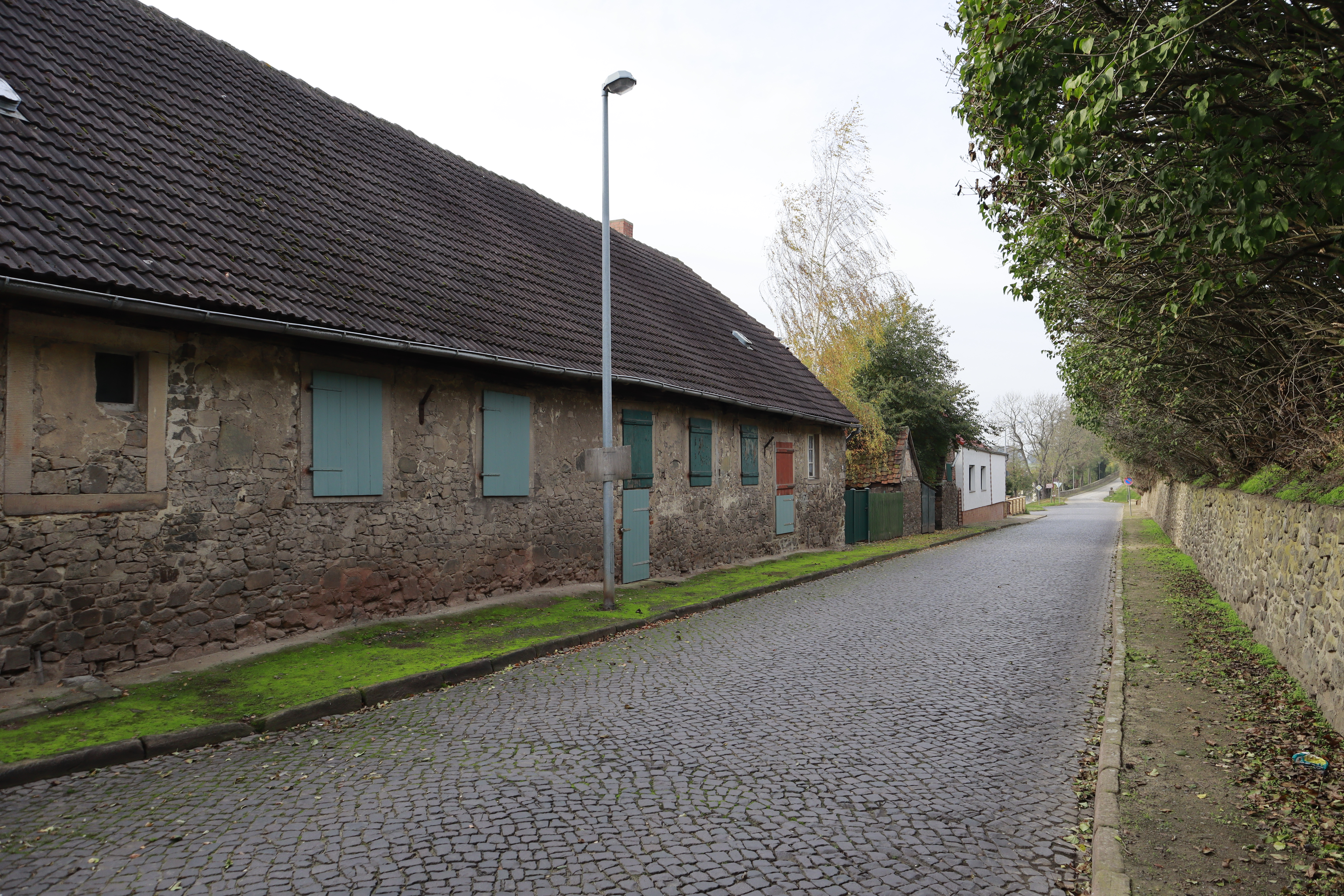 Hundisburg, Magdeburger Str 18/19